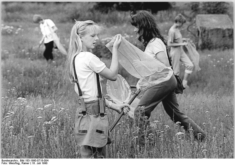 Spreewald, Biosphärenreservat, Artenfeststellung ADN-Rainer Weisflog 18.7.90 Bez. Cottbus: Ferien- Auf Schmetterlingsjagd gehen in diesen Ferientagen die Kinder des traditionellen Bezirksspezialistenlagers junger Entomologen im Spreewald. Im ehemaligen militärischen Sperrgebiet am Weinberg von Neu Zauche hat sich im Laufe der Jahre eine Trockenoase herausgebildet - ein idealer Tummelplatz für Insekten aller Art. Dort finden die Jungen und Mädchen sehr selten gewordene Tiere. Mit ihrer Artenfest-stellung leisten sie eine wichtige Zuarbeit für das Biosphärenresevat Spreewald.